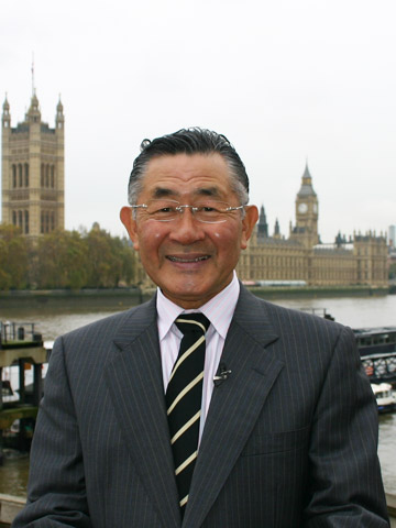 2000年英国ロンドンでサッチャー元英国首相をテレビインタビューした。